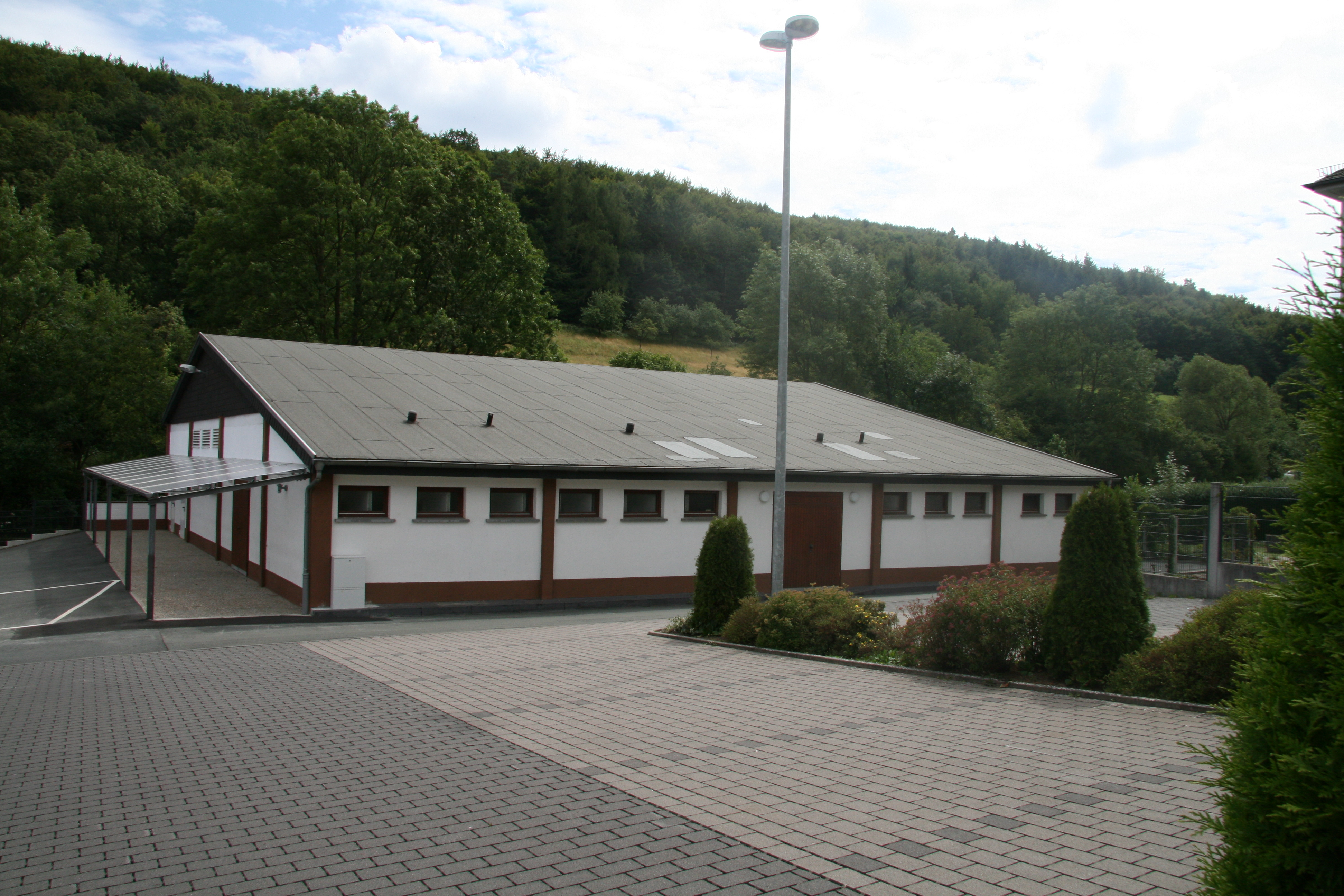 Versammlungsgebäude der Raven-Brüder (Plymouth Brethren Christian Church) in Bad Endbach